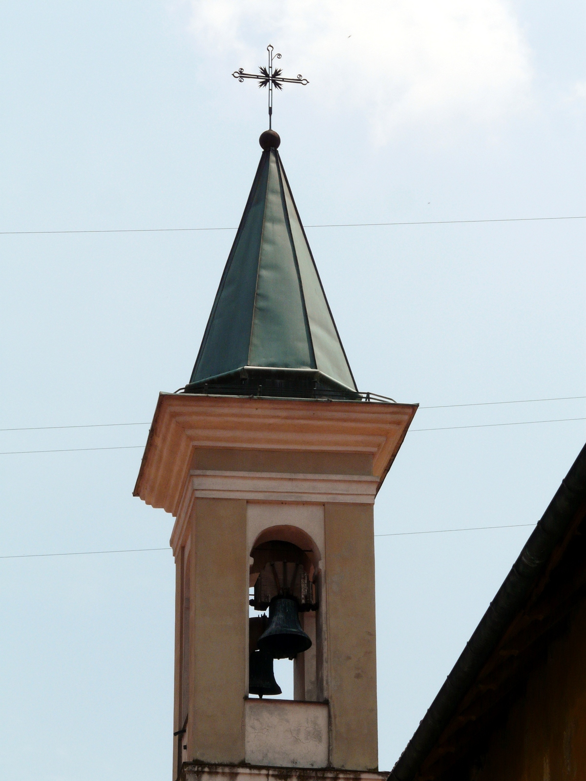 Oratorio di Santa Caterina, Rossiglione, Liguria, Italia